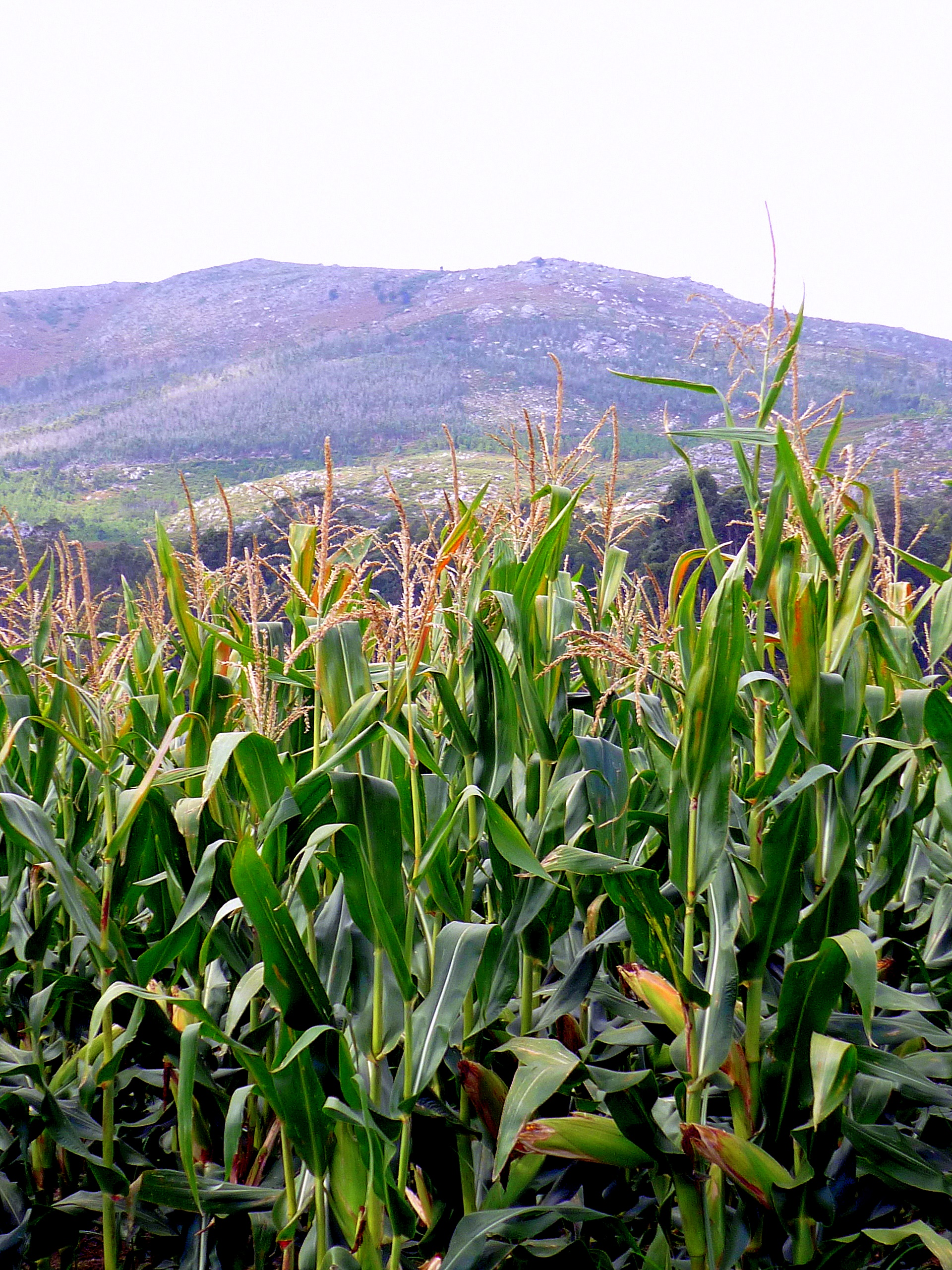 Millo grande, A Coruña